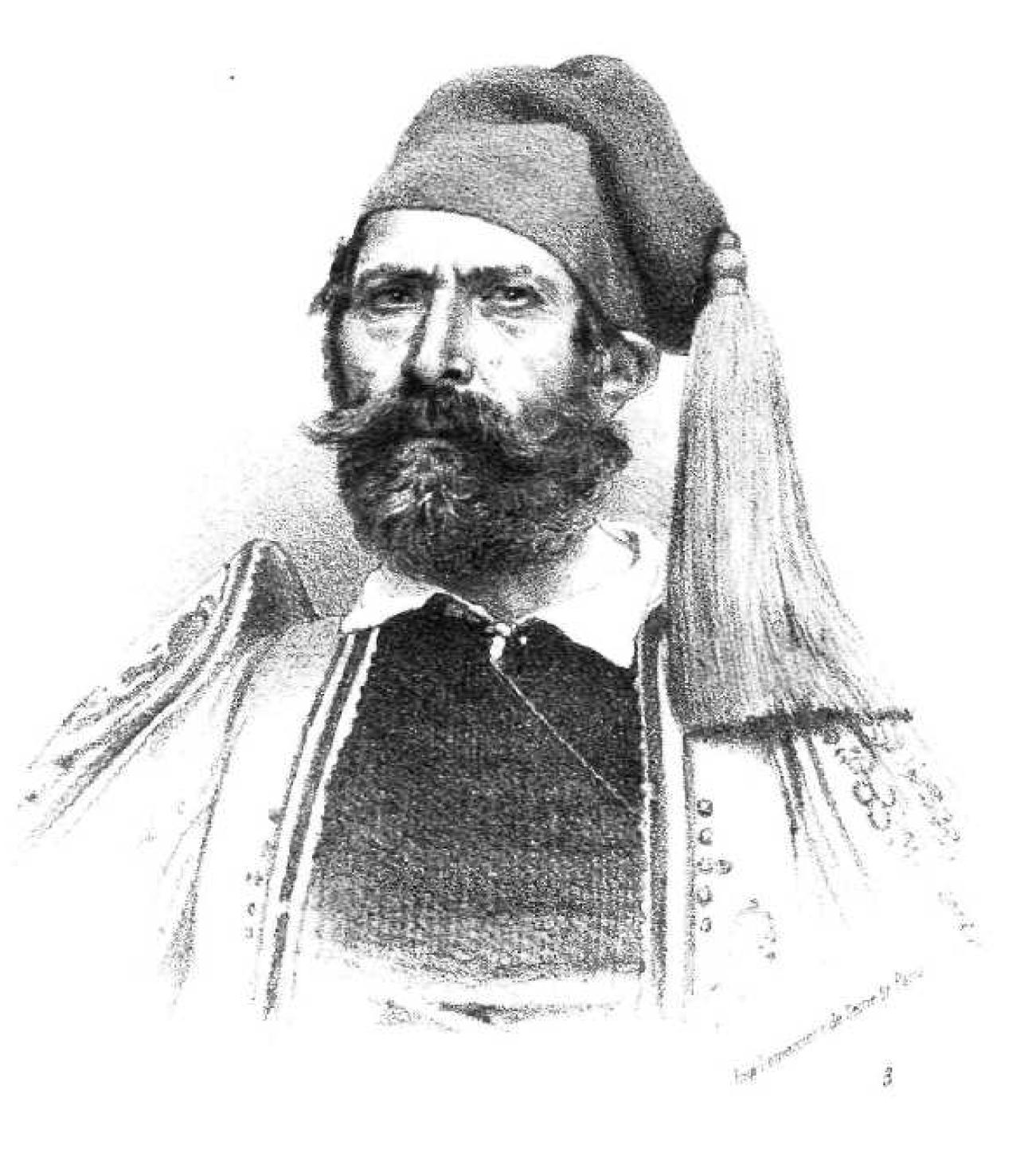 Griechischer Freiheitskämpfer, 19. Jahrhundert